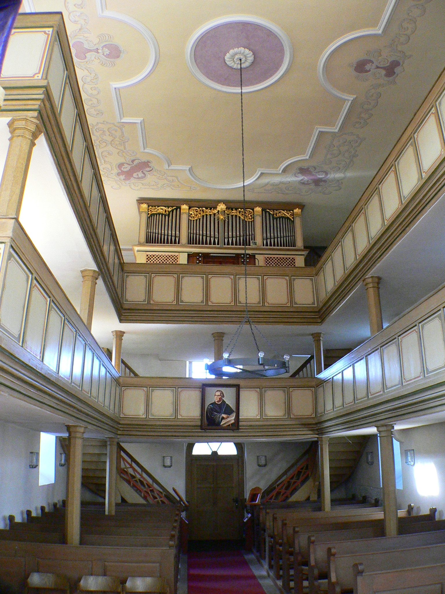 Bad Rodach Ortsteil Heldritt, Kircheninnenraum